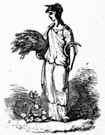 Ceres